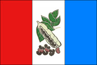 Bandeira de Adelândia, Goiás, Brasil.